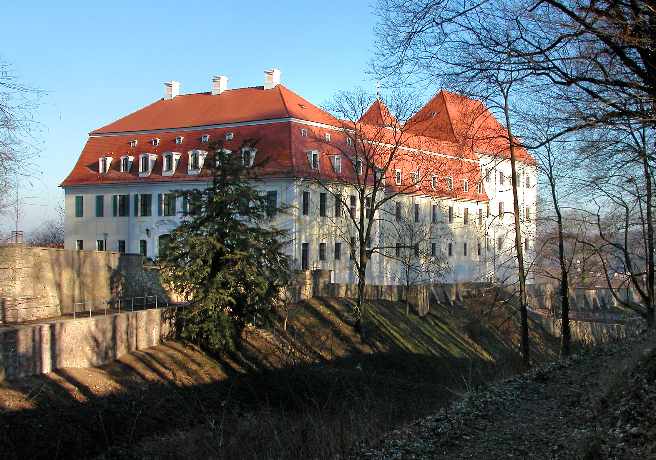 16.01.2005 01662 Meißen-Siebeneichen: Schloß Siebeneichen. Vierflügelanlage. Ältere Teile um 1550, spätere Anbauten 1745. Sicht von Südwesten. Als Bildungsstätte genutzt. [DSCN5824.TIF]20050116510DR.JPG(c)Blobelt